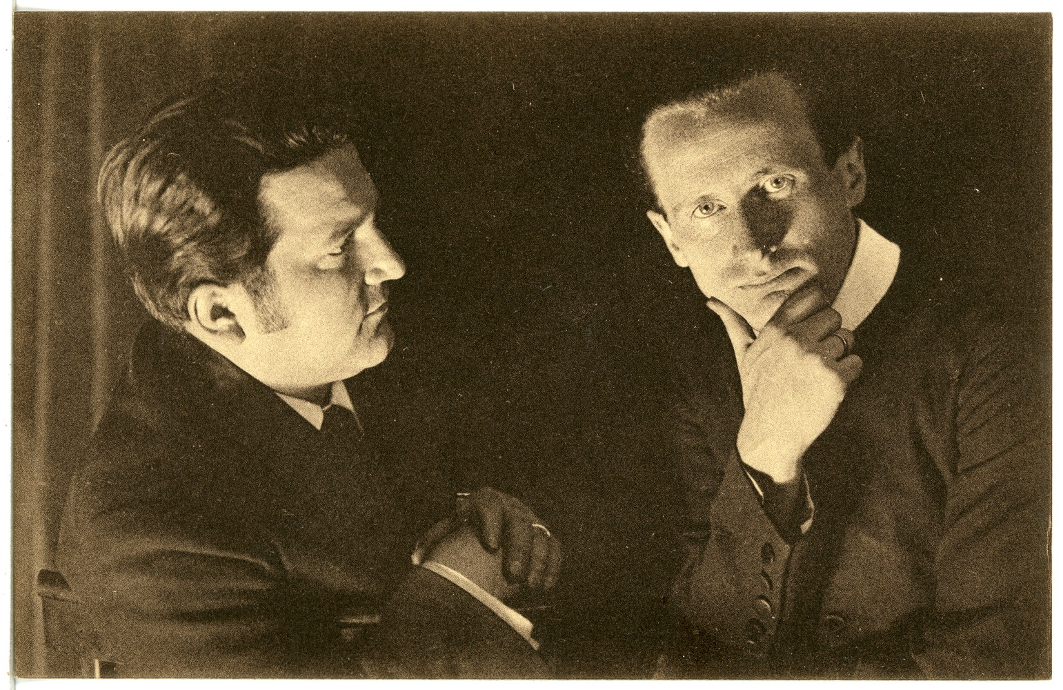 Freiburg i. B.; Harlan - Lucas - Abende This postcard is from publisher Brück & Sohn in Meißen ( postcard has a unique number 23881 and is available in a higher resolution at the publisher. This images was uploaded in a cooperation project between Wikipedians and the publisher.